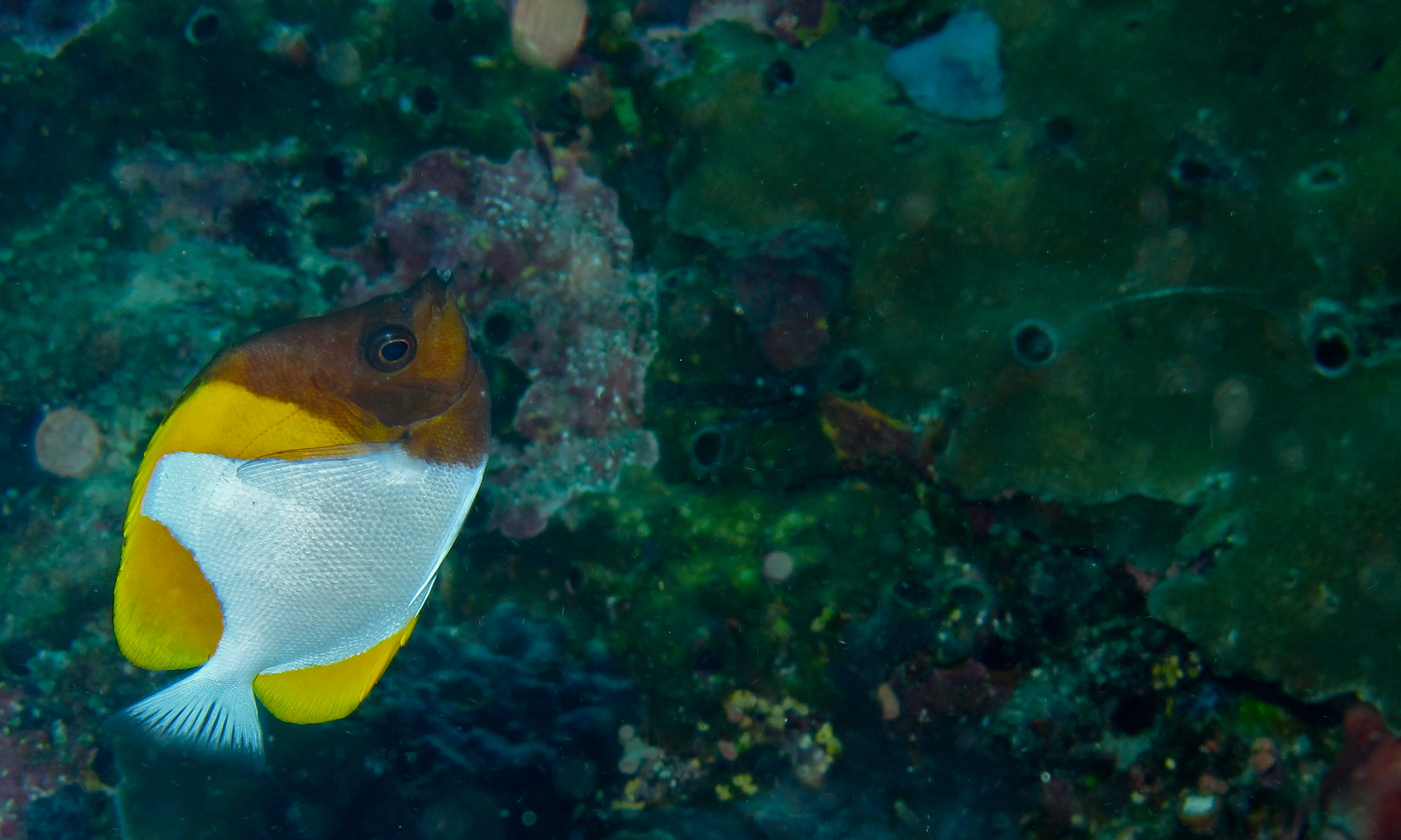 Tanjung, Bunaken Island, Sulawesi, INDONESIA